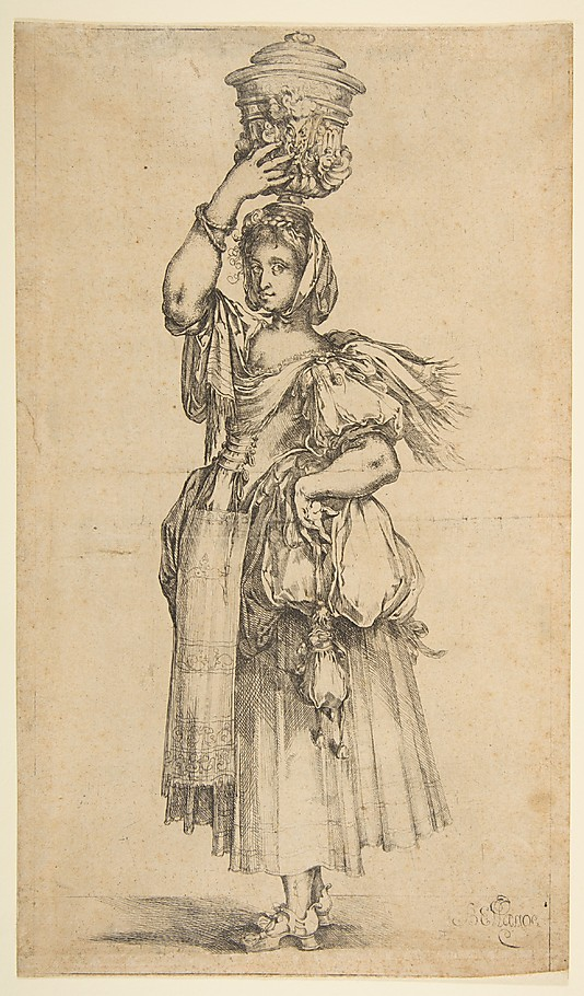 Jacques Bellange Jardiniere